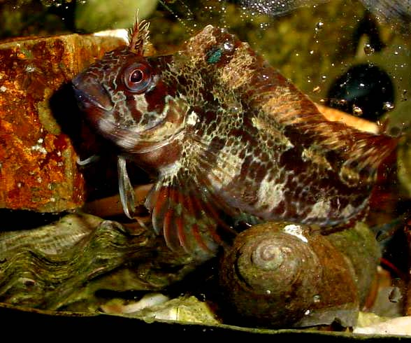 Schleimfisch (Parablennius gattorugine), Felsküste, Bretagne, Foto: Manuel Werner, Nürtingen, GNU-Lizenz